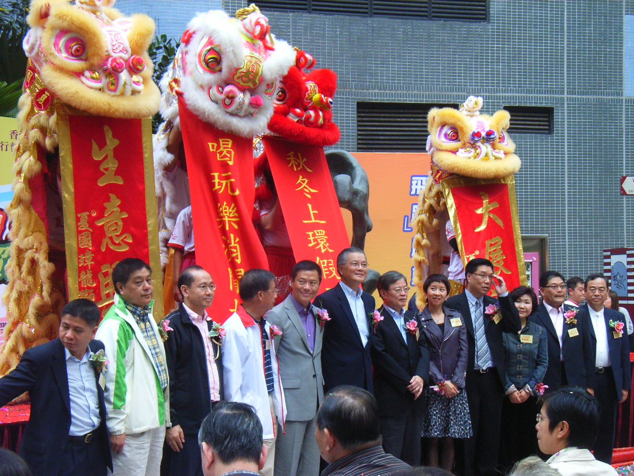 中文（香港）: 上環永樂街與摩利臣街交界，即十皇殿附近 2008~2009秋冬上環假日行人坊 Lion dance